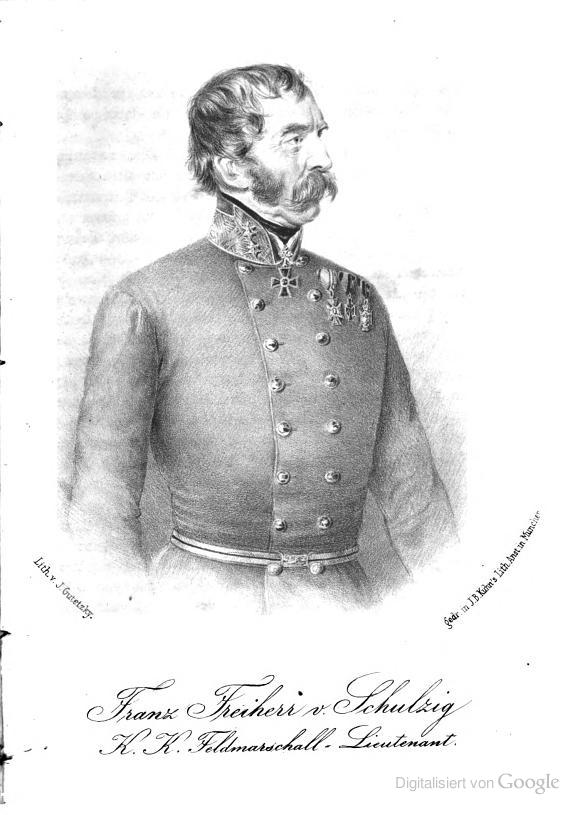 Feldmarschalleutnant Freiherr Franz Joseph Floria von SchulzigSchulzig Geb. Bodanitz, Böhmen (Lázně Bohdaneč, Tschechien), 5. 10. 1787; gest. Wien, 3. 1. 1864.